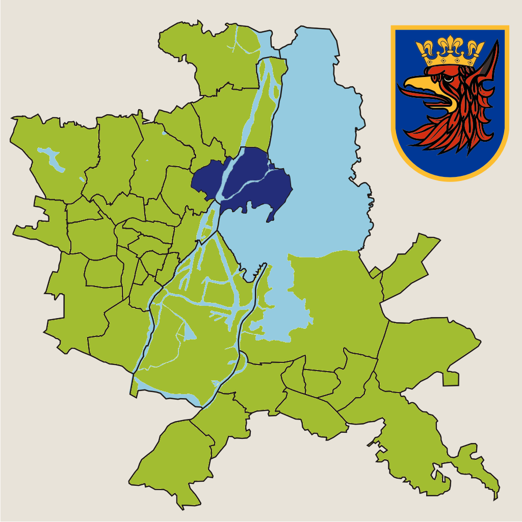 Osiedle "Golęcino-Gocław" w Szczecinie - jednostka pomocnicza miasta w 2010